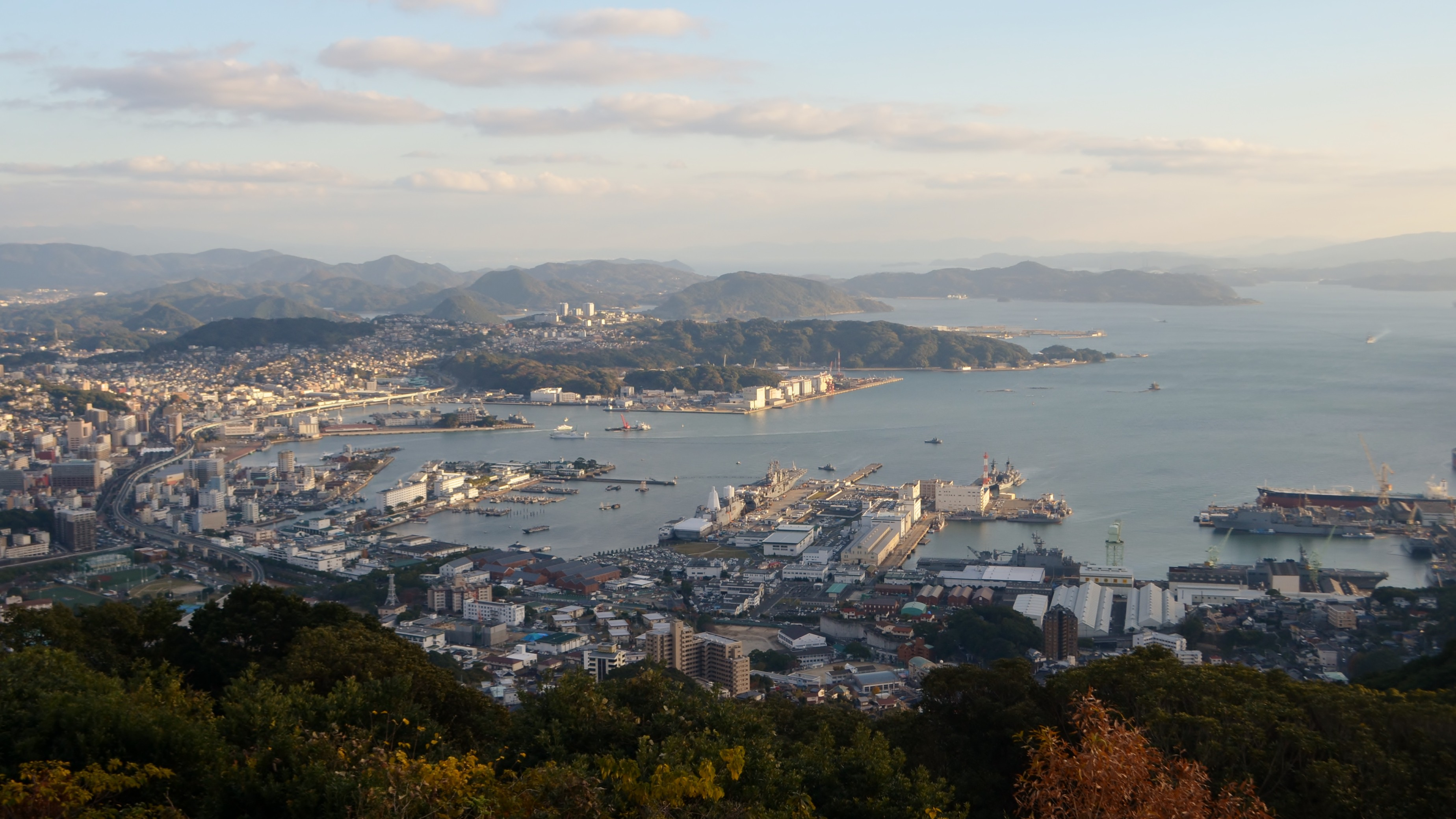 弓張岳展望台から撮影した佐世保市、佐世保港